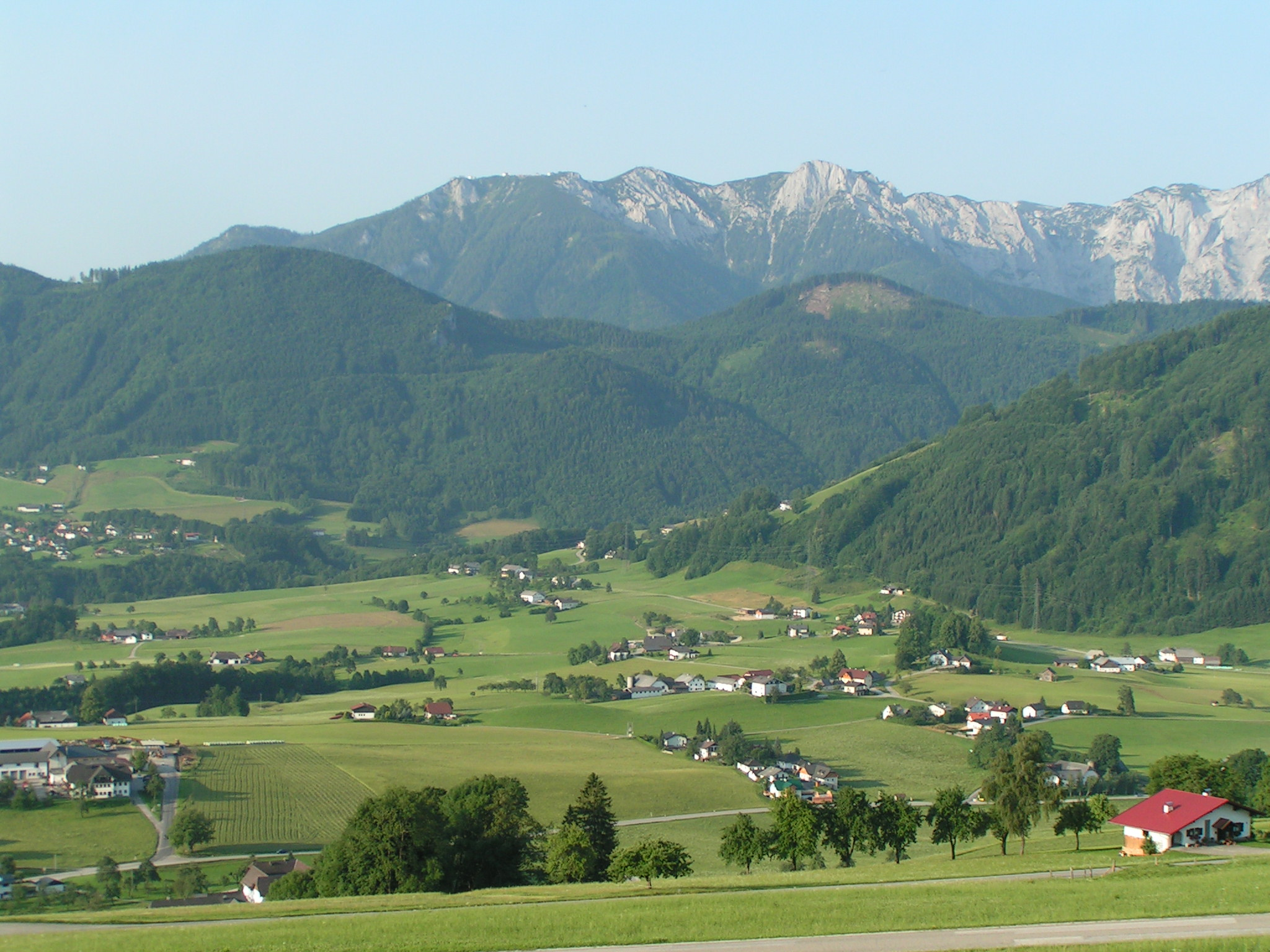 Blick vom Grasberg über die Viechtau auf das Höllengebirge